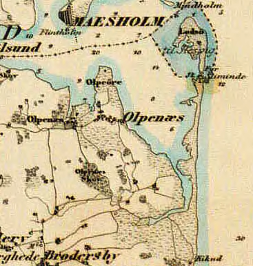 Detail fra Generalstabens Kaart over Slesvig, 1858